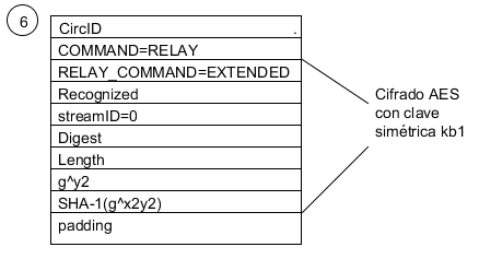 Célula relayextended en Intercambio de células para el establecimiento de circuito en Tor